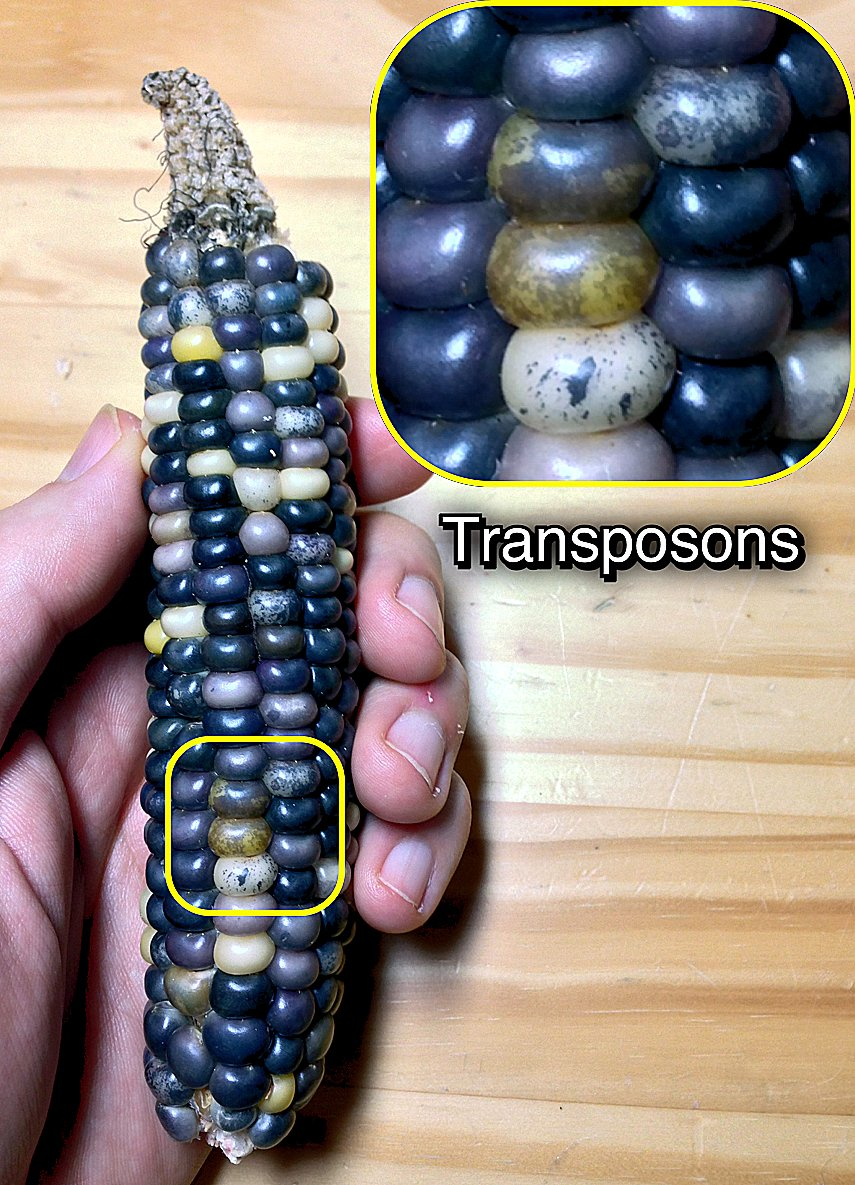 Grains de maïs (Hopi Blue) à la pigmentation modifiée par l'action des transposons.